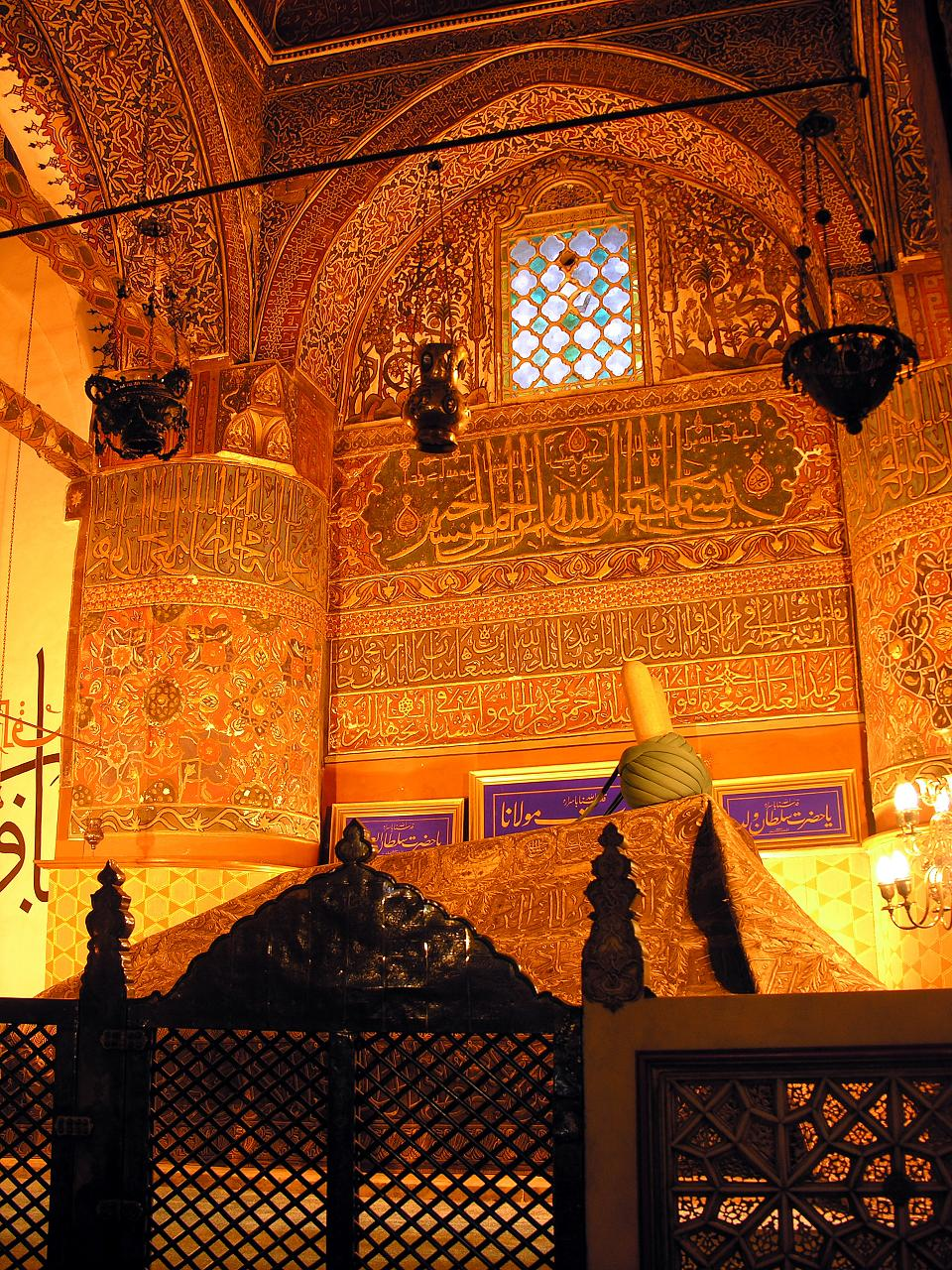 Turkey-2236